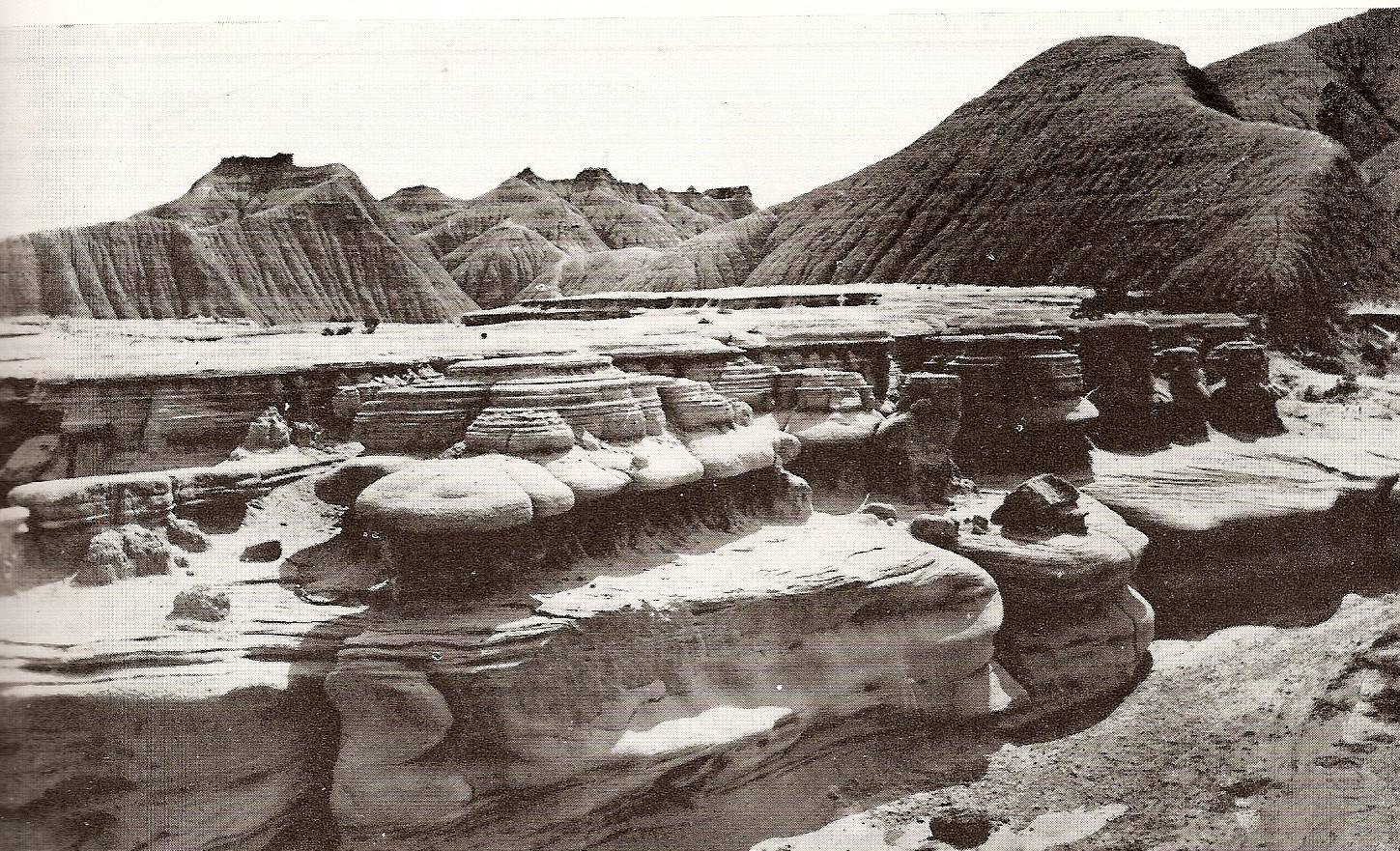 En la carretera Cuara - Quibor, estado Lara - Venezuela